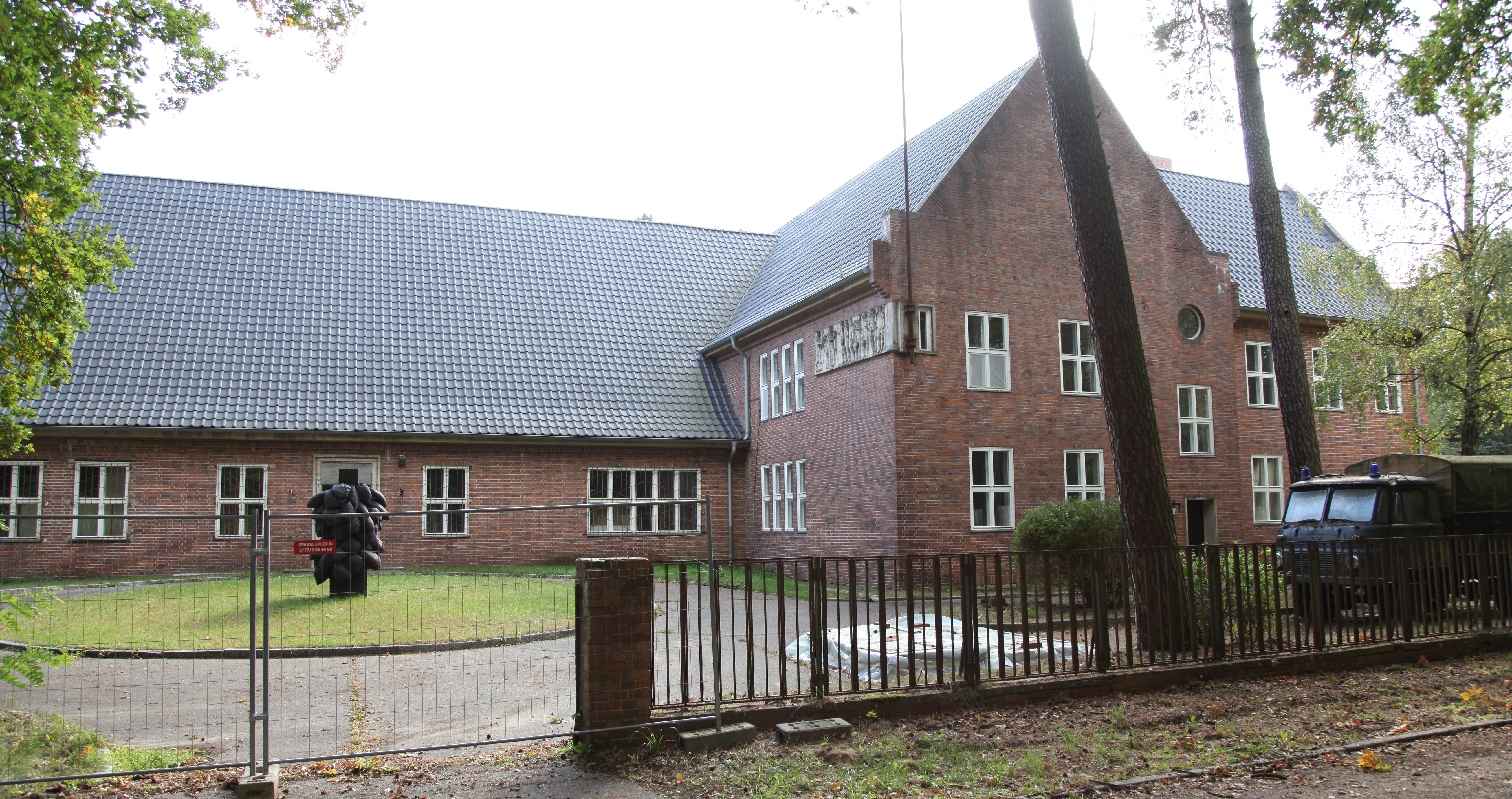 Bau eines Offizierskasinos eines Panzerregiments aus dem Jahr 1936. Architekt: Robert Kisch.